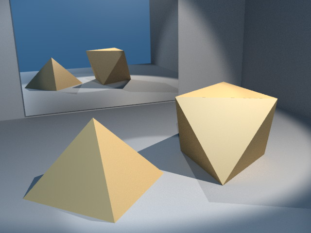 Twee achtvlakken in een kunstmatige ruimte met spiegel; het linker exemplaar is in de ondergrond verzonken tot aan het zwaartepunt. Modellering in Blender, rendering met YafRay